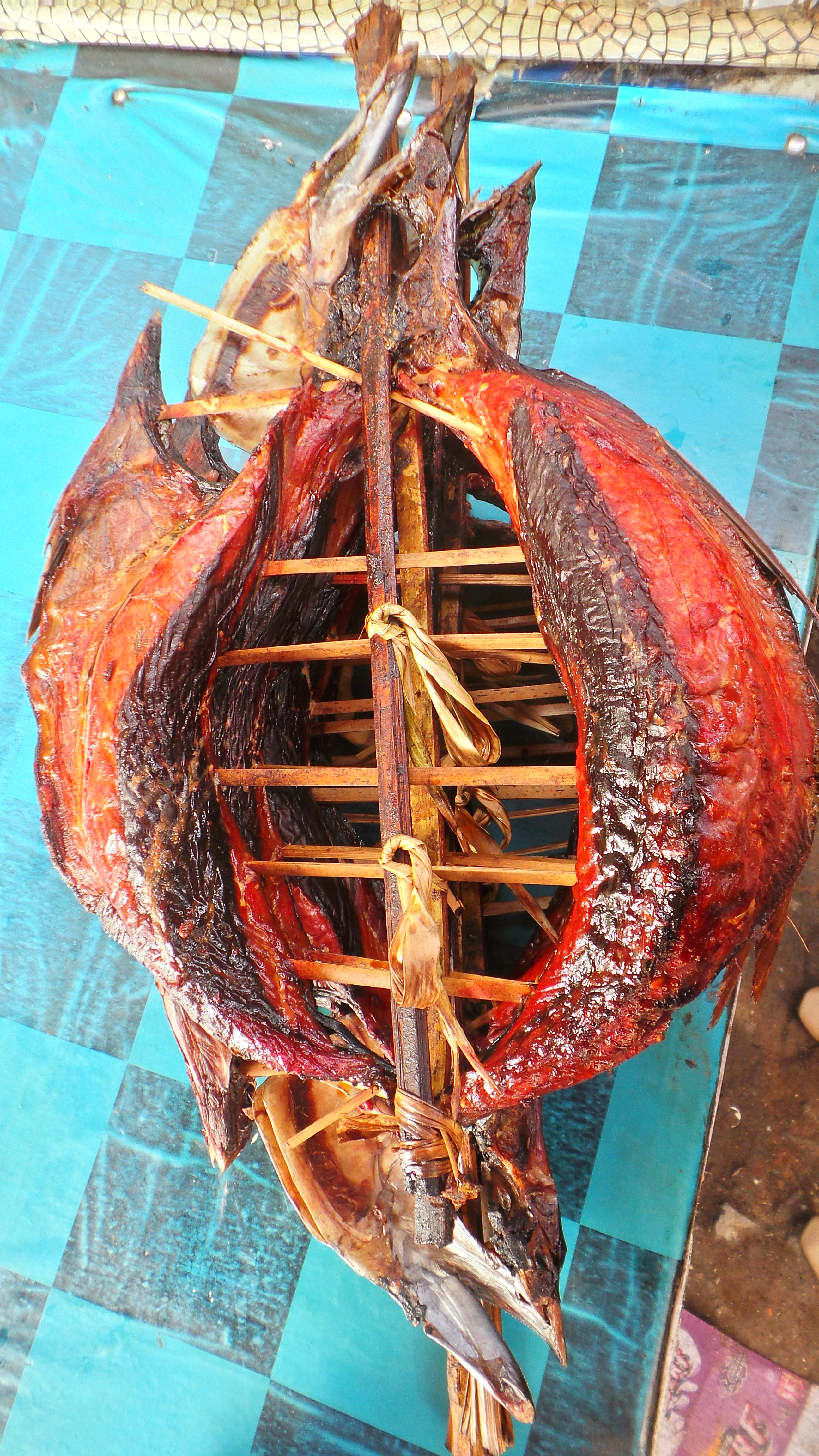 Ikan Cakalang Fufu Asap khas Manado.